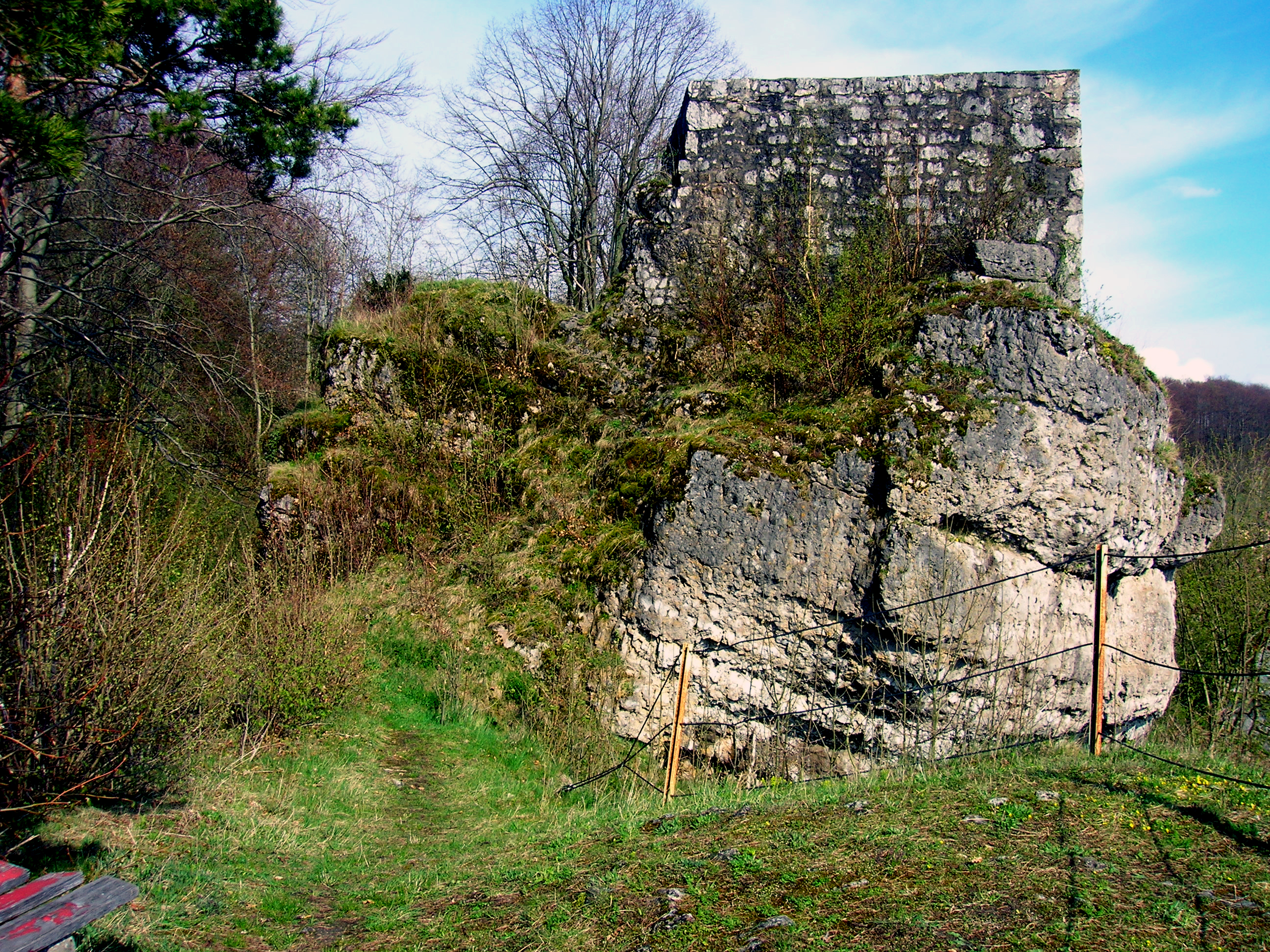 Der Stumpf des Bergfriedes der Burgruine Osternohe aus südwestlicher Richtung